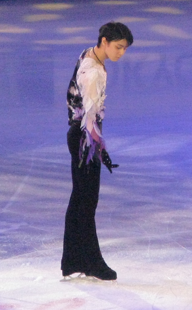 Yuzuru Hanyu au gala des Championnats du monde de patinage artistique 2012 à Nice.